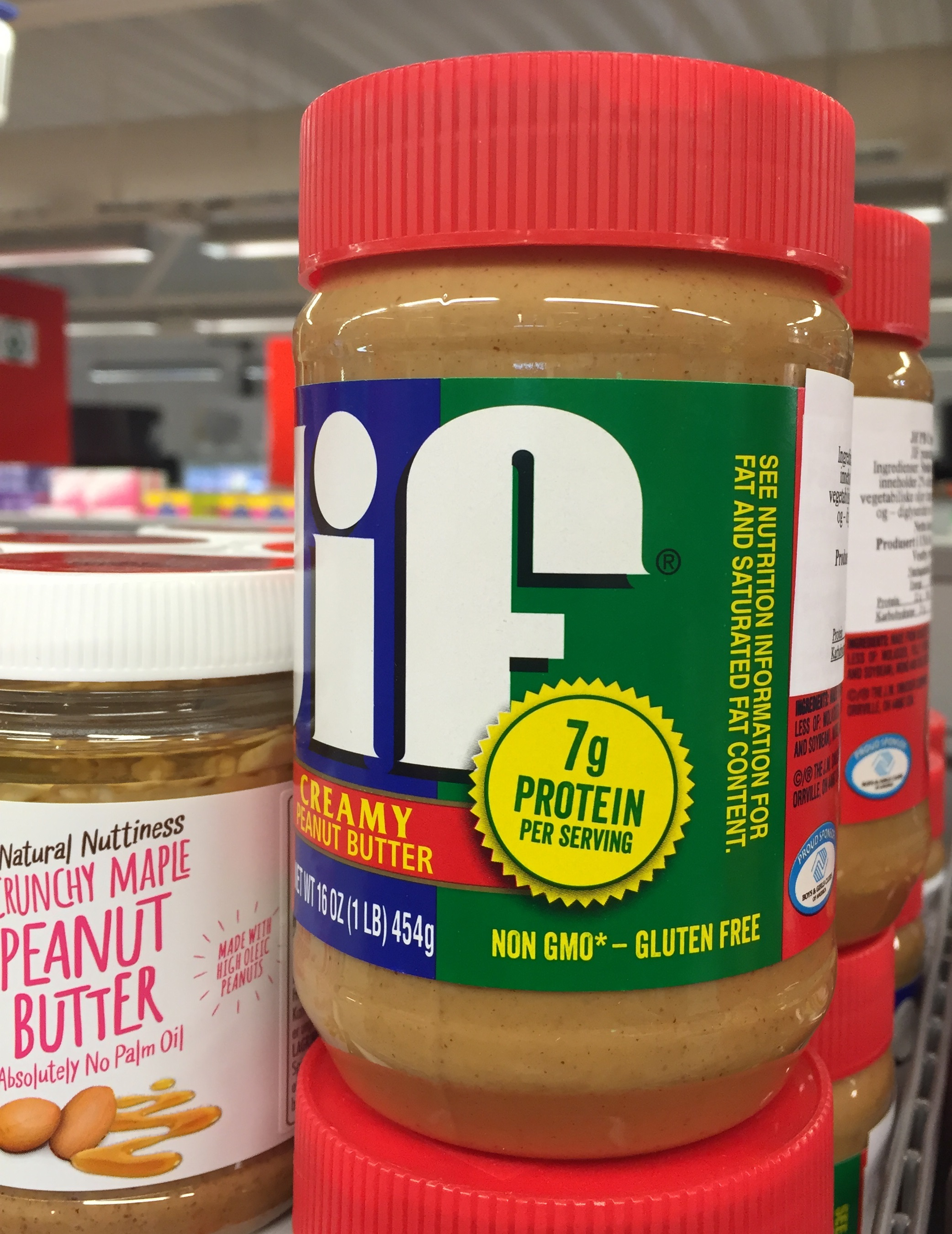 Merking av peanøttsmør med "NON GMO"